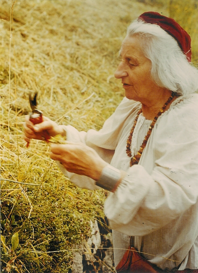 Maria Keller Porträt